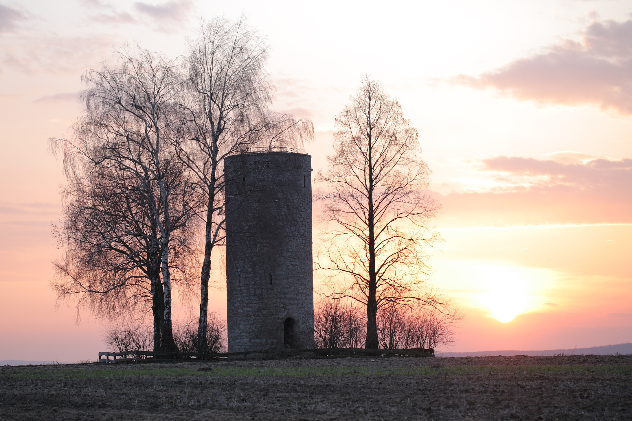 Der Modexer Turm wurde erstmals 1383 erwähnt. Er diente als Wachposten zwischen Landwehr und der Stadt Brakel.